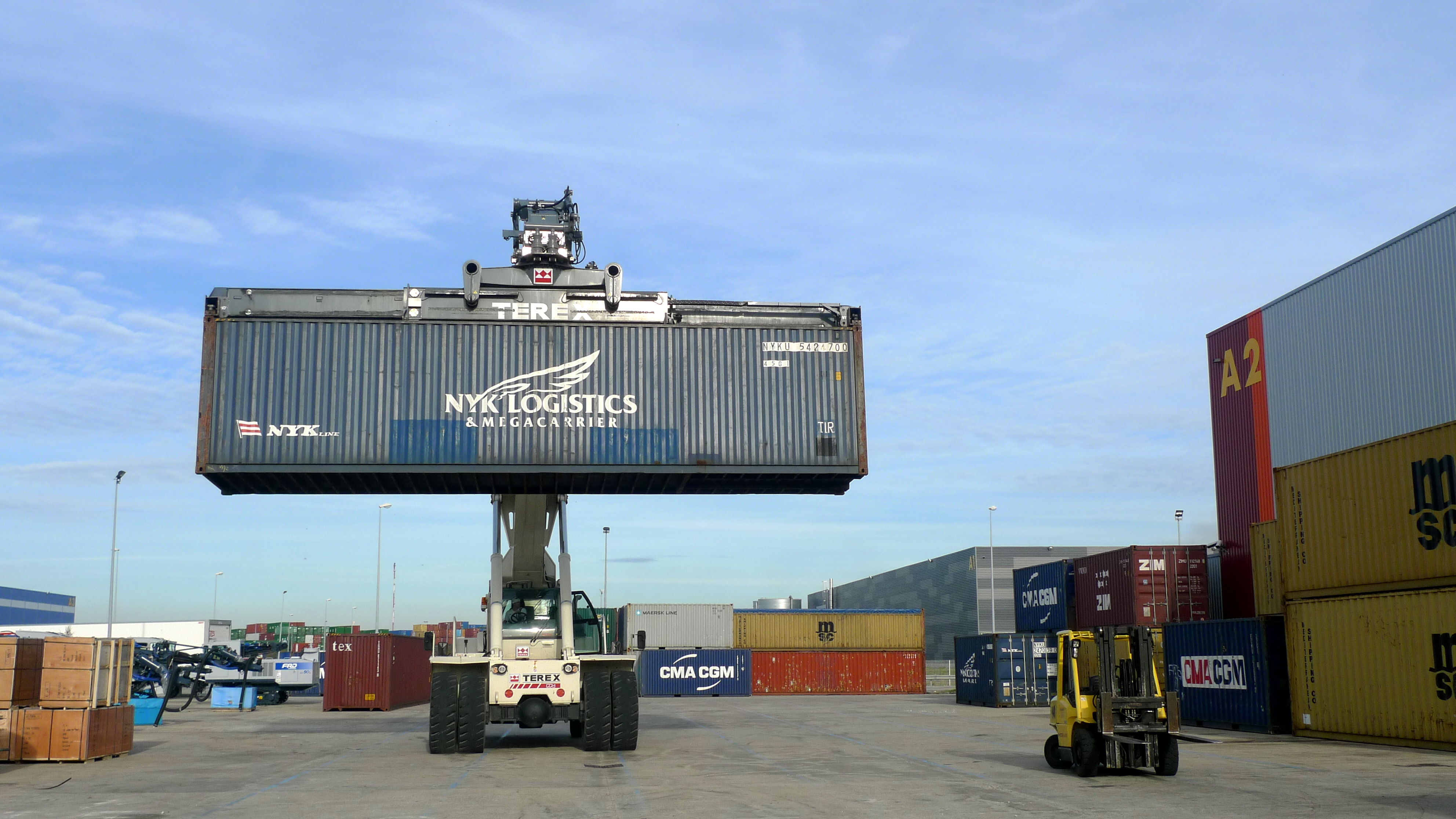 Transport de container dans la zone portuaire